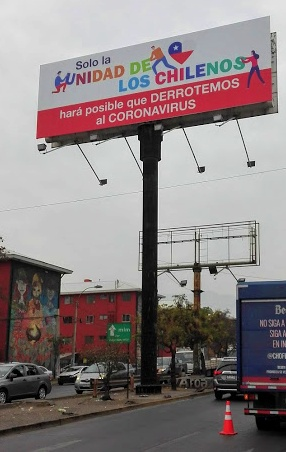 Letrero publicitario con la leyenda "Sólo la unidad de los chilenos hará posible que derrotemos al coronavirus", ubicado en Avenida Departamental con Avenida José Joaquín Prieto, en la comuna de San Miguel, Chile.